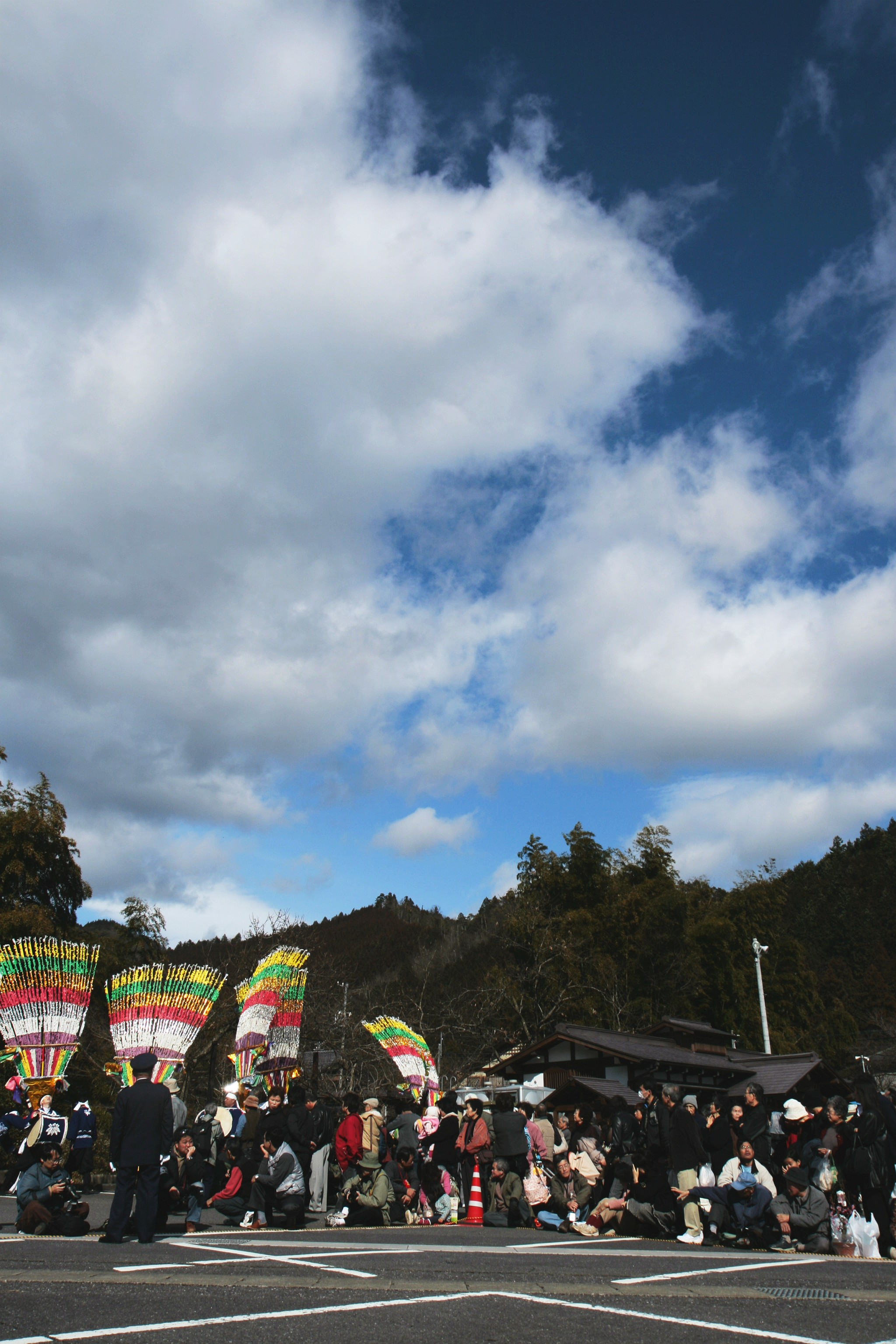 谷汲おどり (岐阜県揖斐郡揖斐川町)